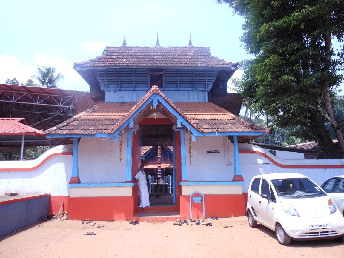 പുലിയന്നൂർ മഹാദേവക്ഷേത്രം